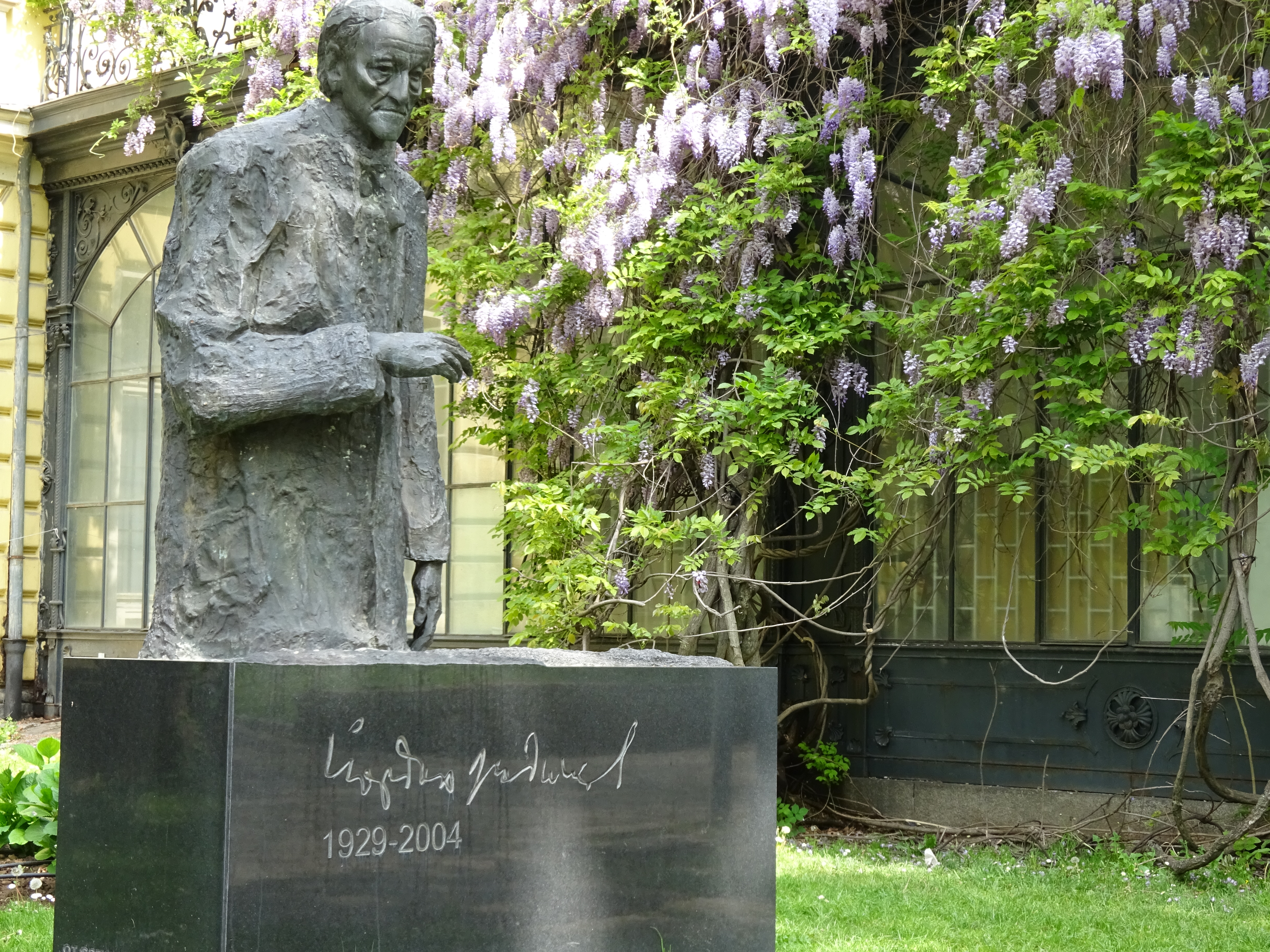 Паметникът на Йордан Радичков, София